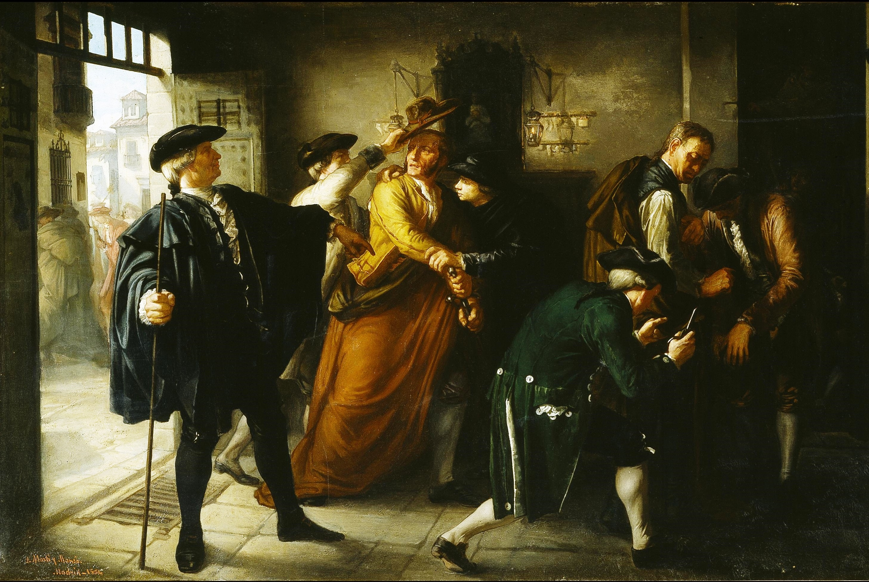 La obra representa el Motín de Esquilache, ocurrido en Madrid en 1766 durante el reinado de Carlos III de España. El episodio histórico corresponde a una revuelta popular en Madrid en 1766: siguiendo lo ordenado en el bando de las capas y los sombreros, unos sastres arreglan esas prendas para que no sean capas largas y sombreros chambergos, sino capas cortas y sombreros de tres picos. Un afectado parece resistirse, y es contenido por un clérigo (los jesuitas fueron acusados de haber instigado el motín). Un alguacil preside la escena con gesto autoritario.